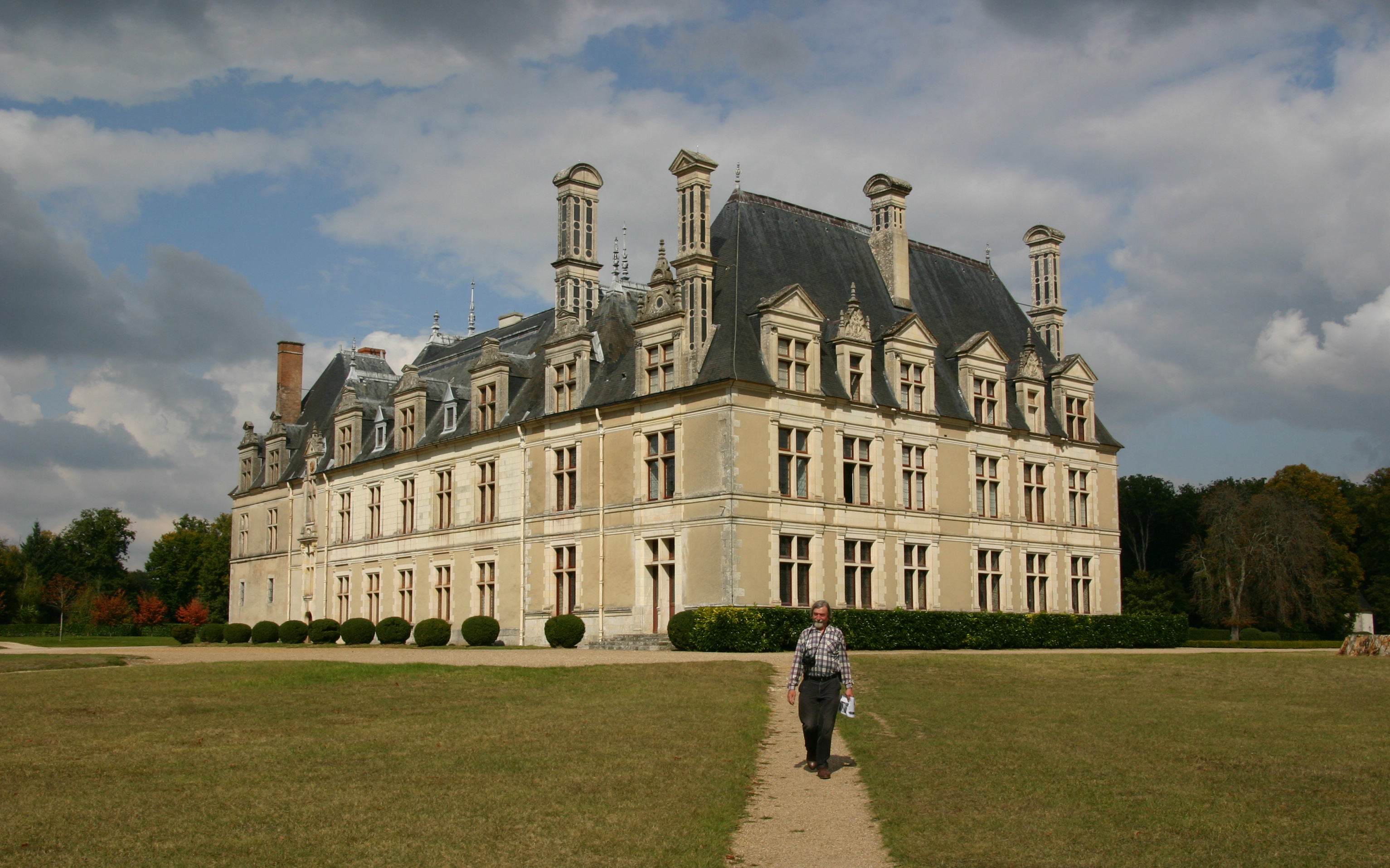 Château de Beauregard